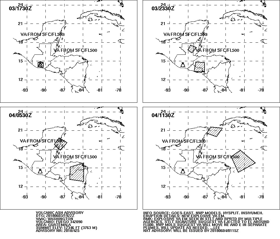 Major eruption of volcan de fuego fuego in Guatemala